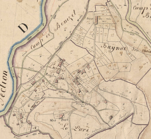 El Veïnat d'en Xeis de Sant Llorenç de Cerdans en el Cadastre napoleònic del 1812 (Arxius Departamentals dels Pirineus Orientals)